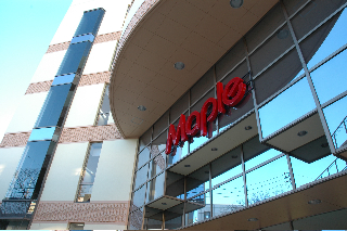 メイプル正面